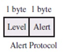 protokoli alarmues